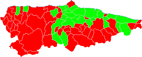 Crecimiento vegetativo por municipios (2007-2008)